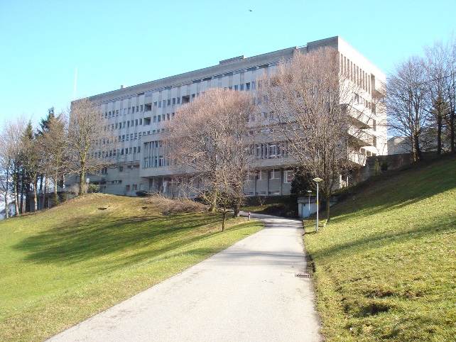 Kloster Ingenbohl